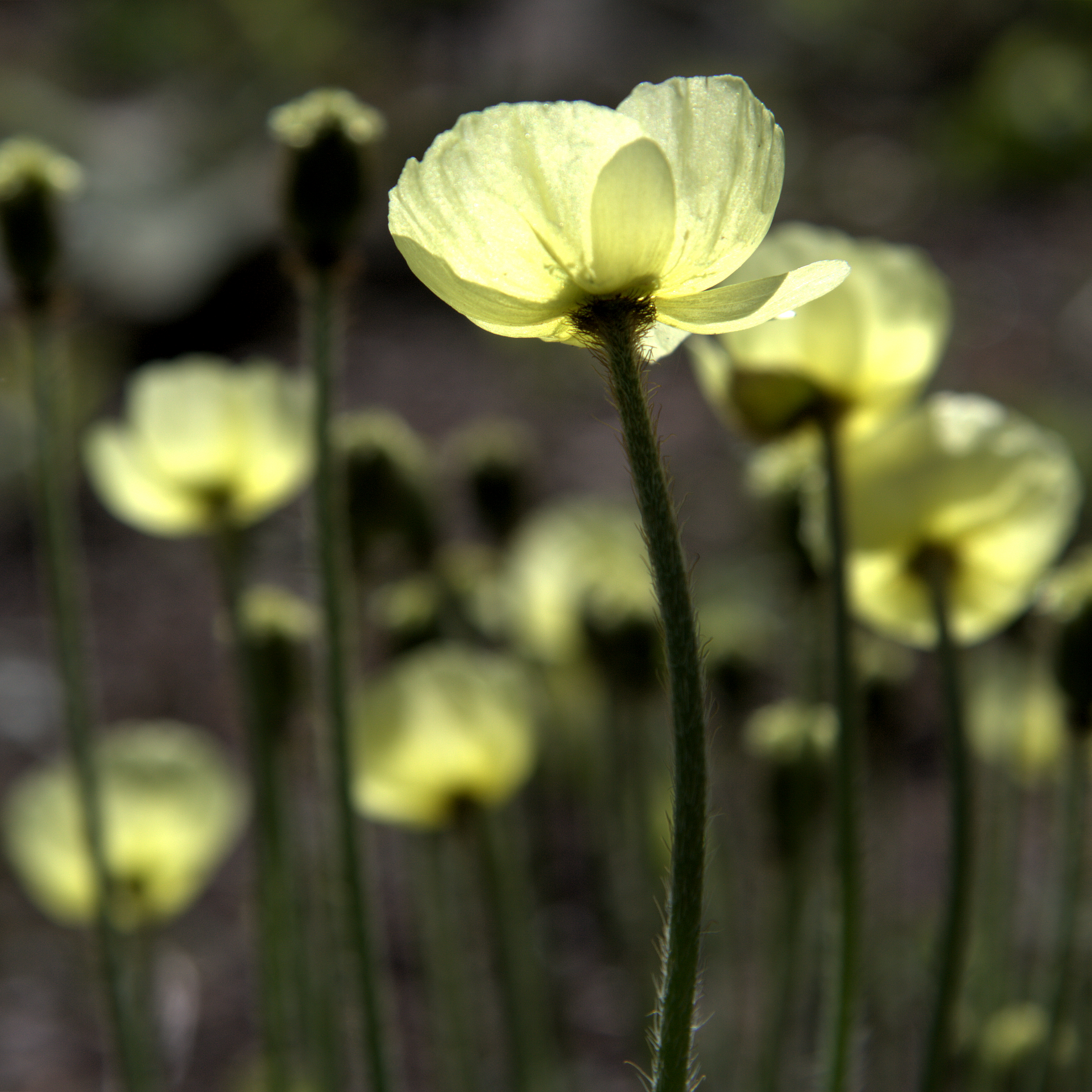 Papaver laestadianum (=Papaver radicatum subsp. laestadianum'